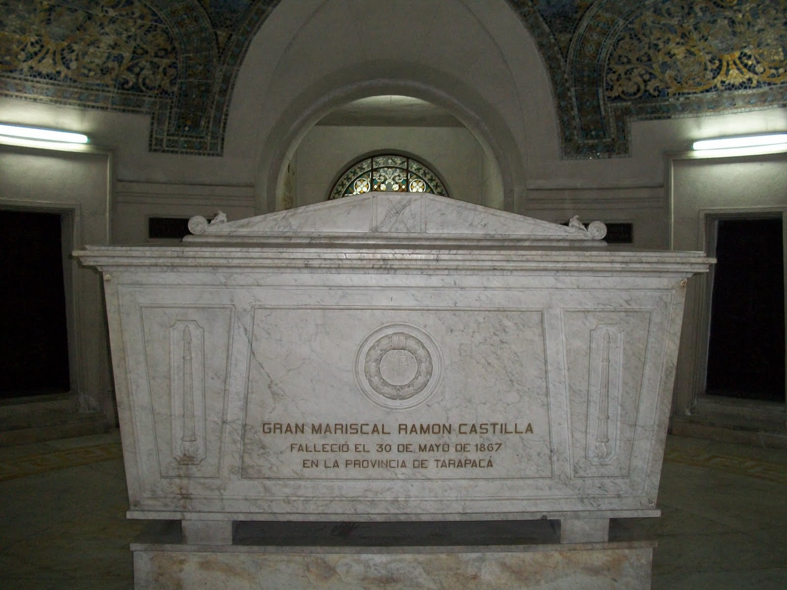 la tumba de ramon castilla en Cementerio Presbítero Maestro